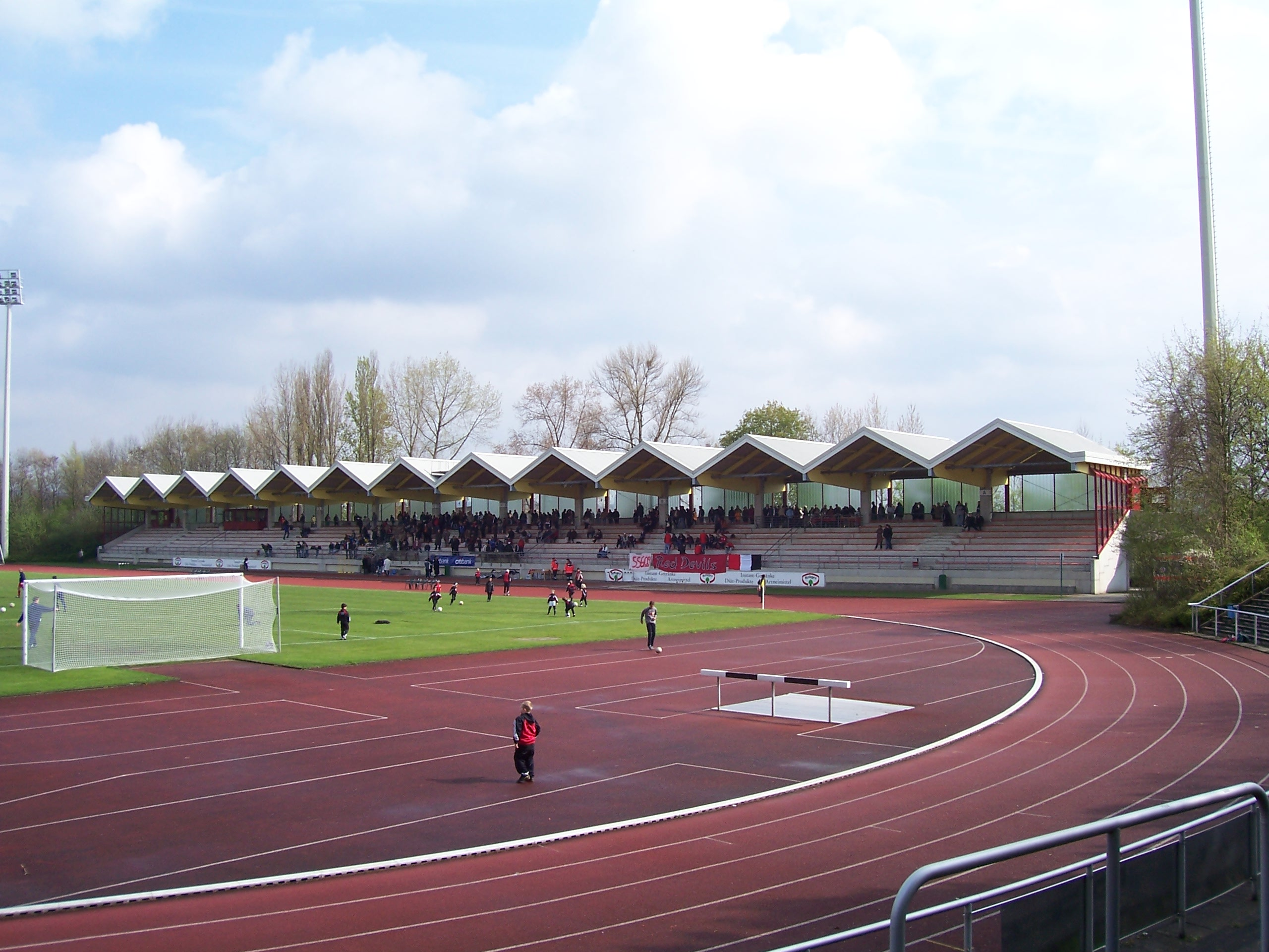 Stadion an der Paffrather Straße (Belkaw-Arena), Bergisch Gladbach Ort: Bergisch Gladbach, NRW, Deutschland